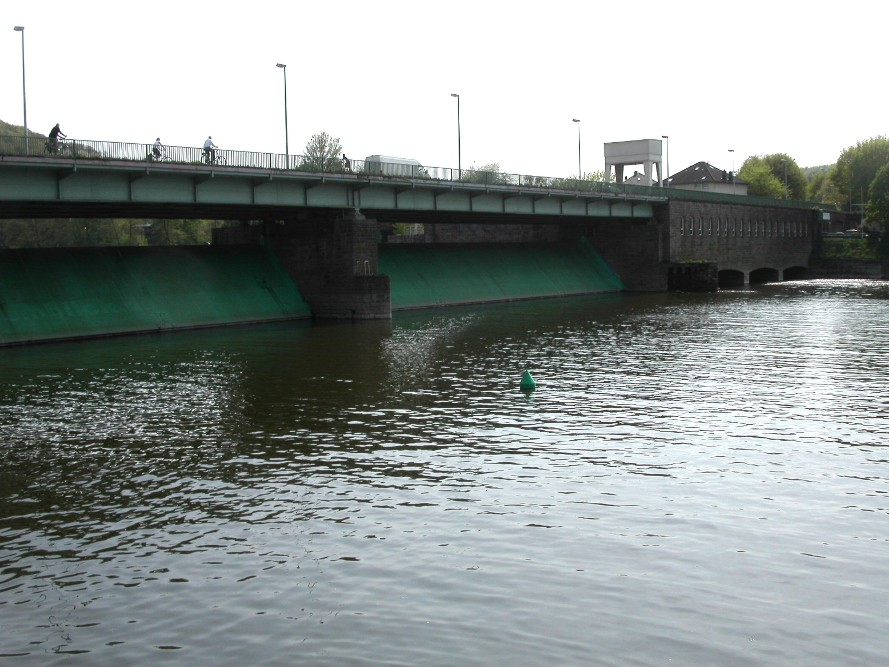 Kettwiger Stauwehr, Essen-Kettwig